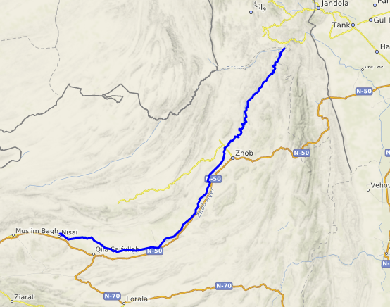 carte réalisée sur umap This map may be incomplete, and may contain errors. Don't rely solely on it for navigation.